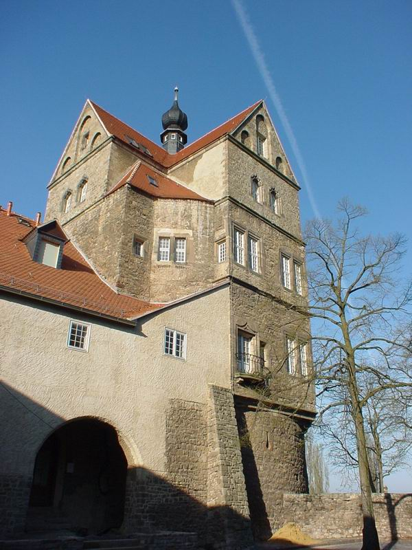 Seeburg, Witwenturm vom unteren Vorhof aus. eigenes Foto von 2004